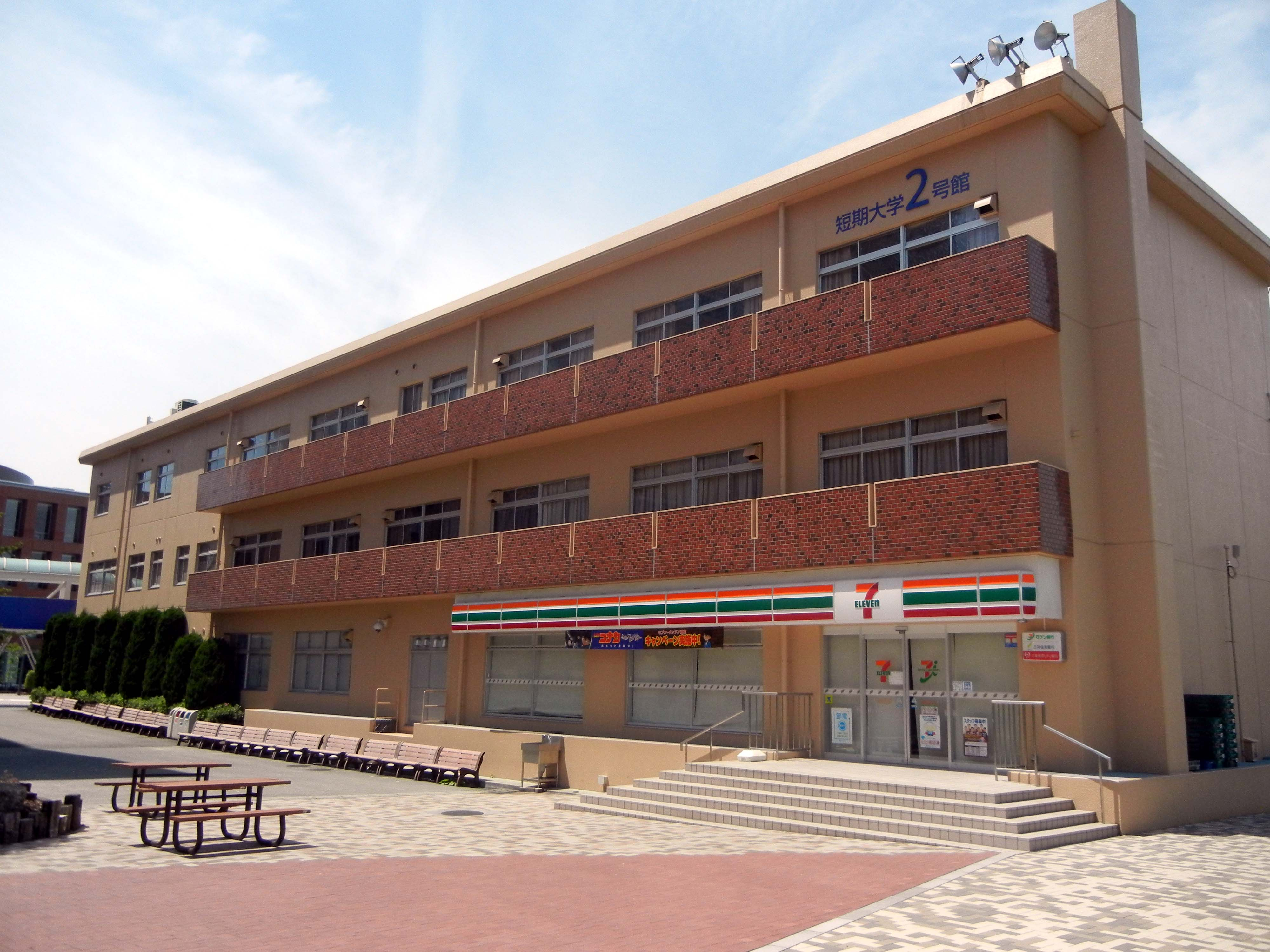 帝京大学八王子キャンパス短期大学2号館